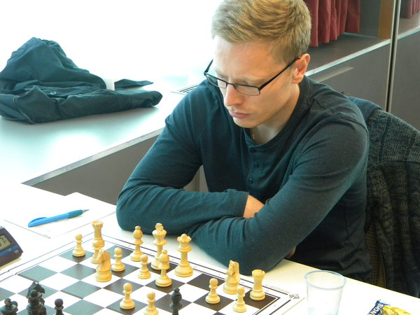 SMM 2016